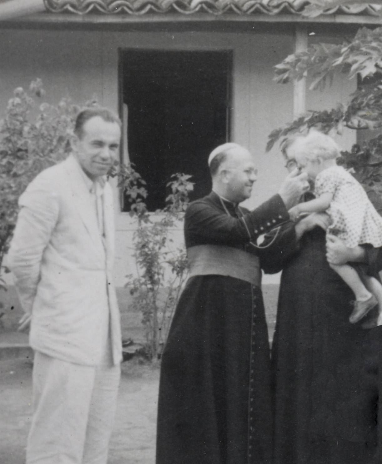 Dom Carlos de Gouvêa Coelho, bispo de Nazaré da Mata, com o Dr. João Schneider e o Padre Otto Sailer, pároco de Taquaritinga do Norte.